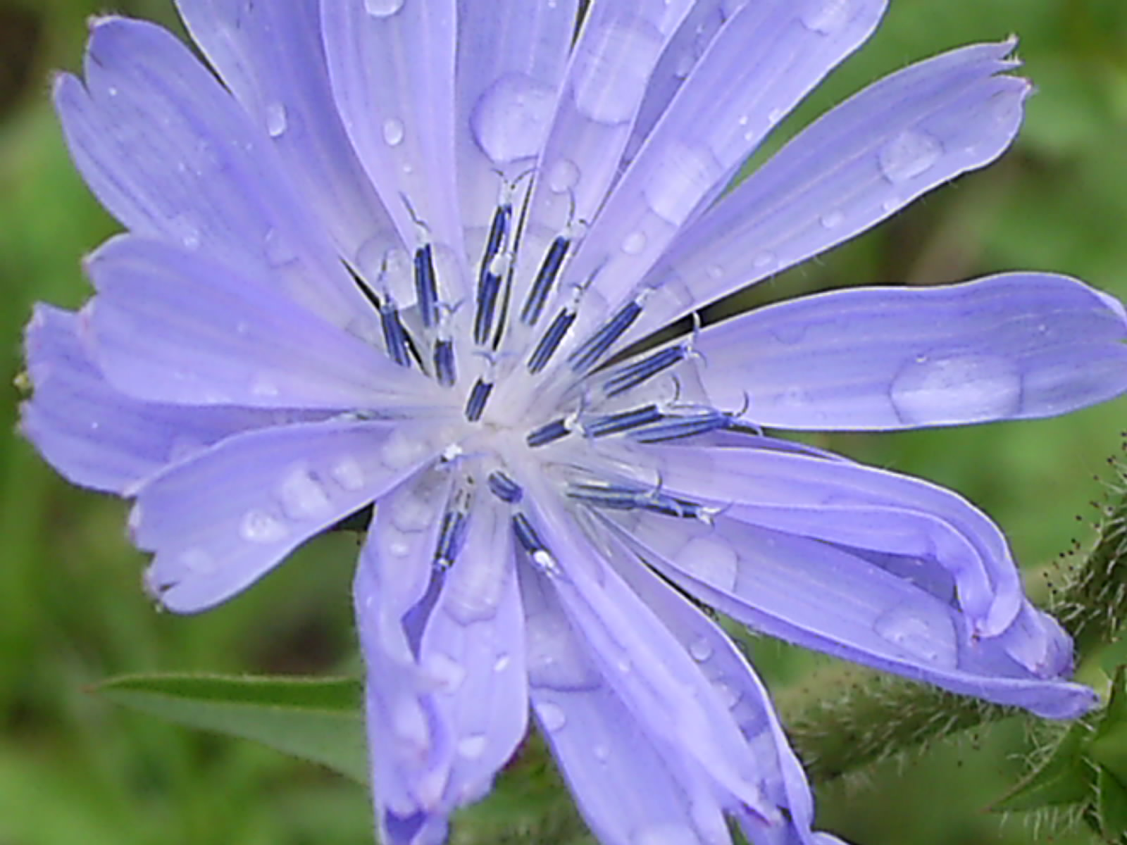 Rosa na cvetu Navadnega potrošnika.